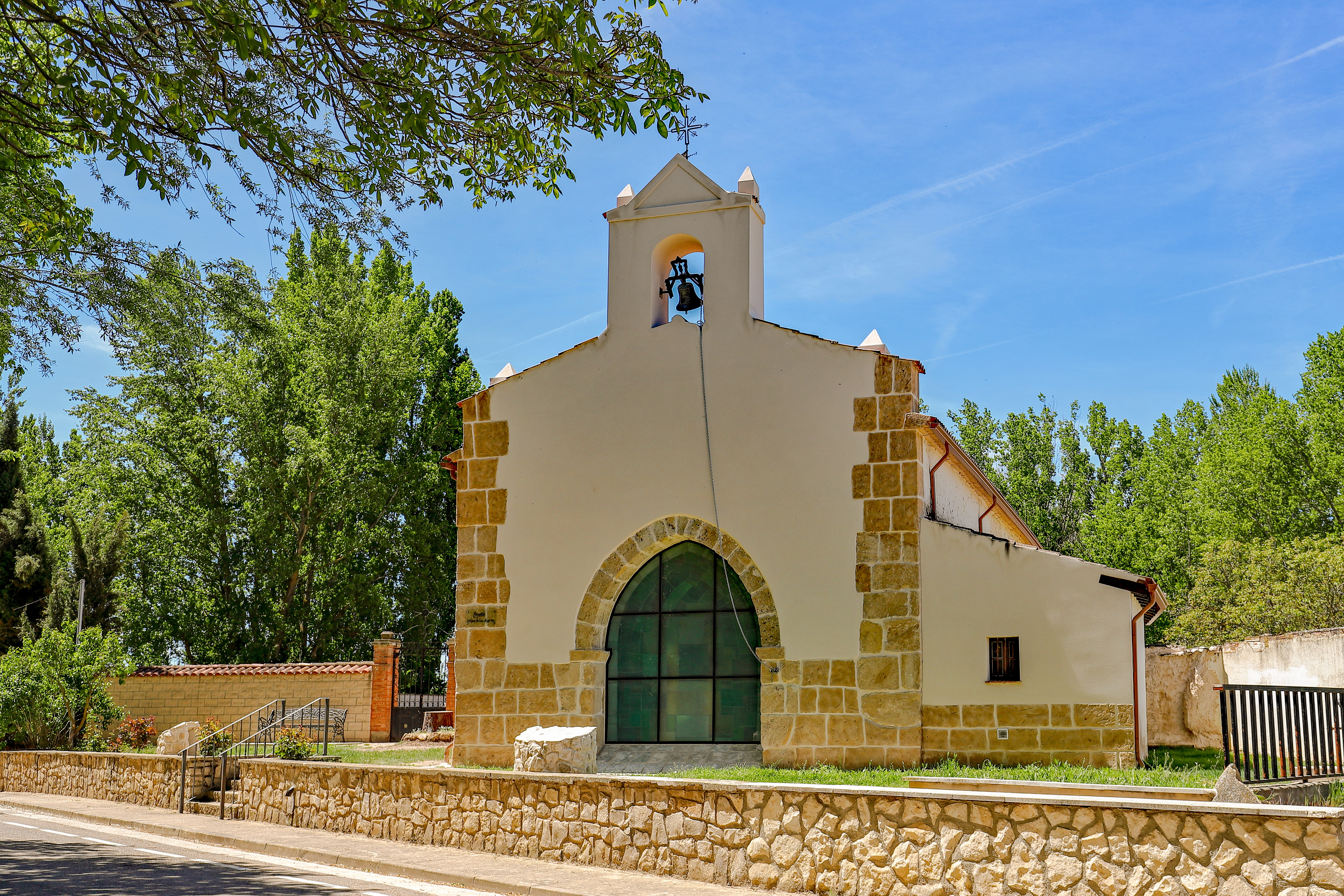 Berlangas de Roa es un municipio de la comarca Ribera del Duero, en la provincia de Burgos.